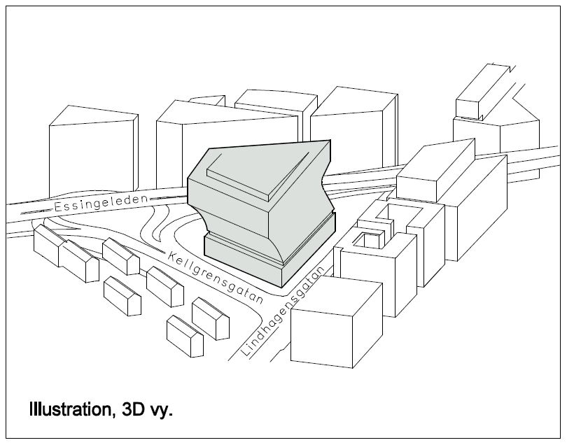 Schematisk illustration på förslag för detaljplan 2010-11724 för fastigheten "Kristinebergs slott 11 mm" (Samverkanscentralen) även kallad "Blåljushuset"